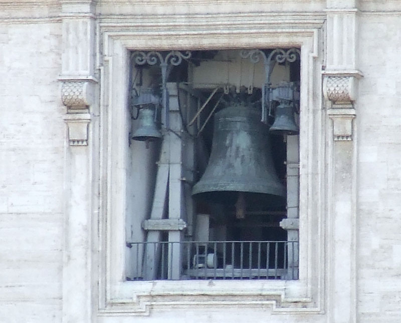 Basilica di San Pietro, Roma, Vaticano, gruppo delle campane sul lato sinistro del prospetto principale